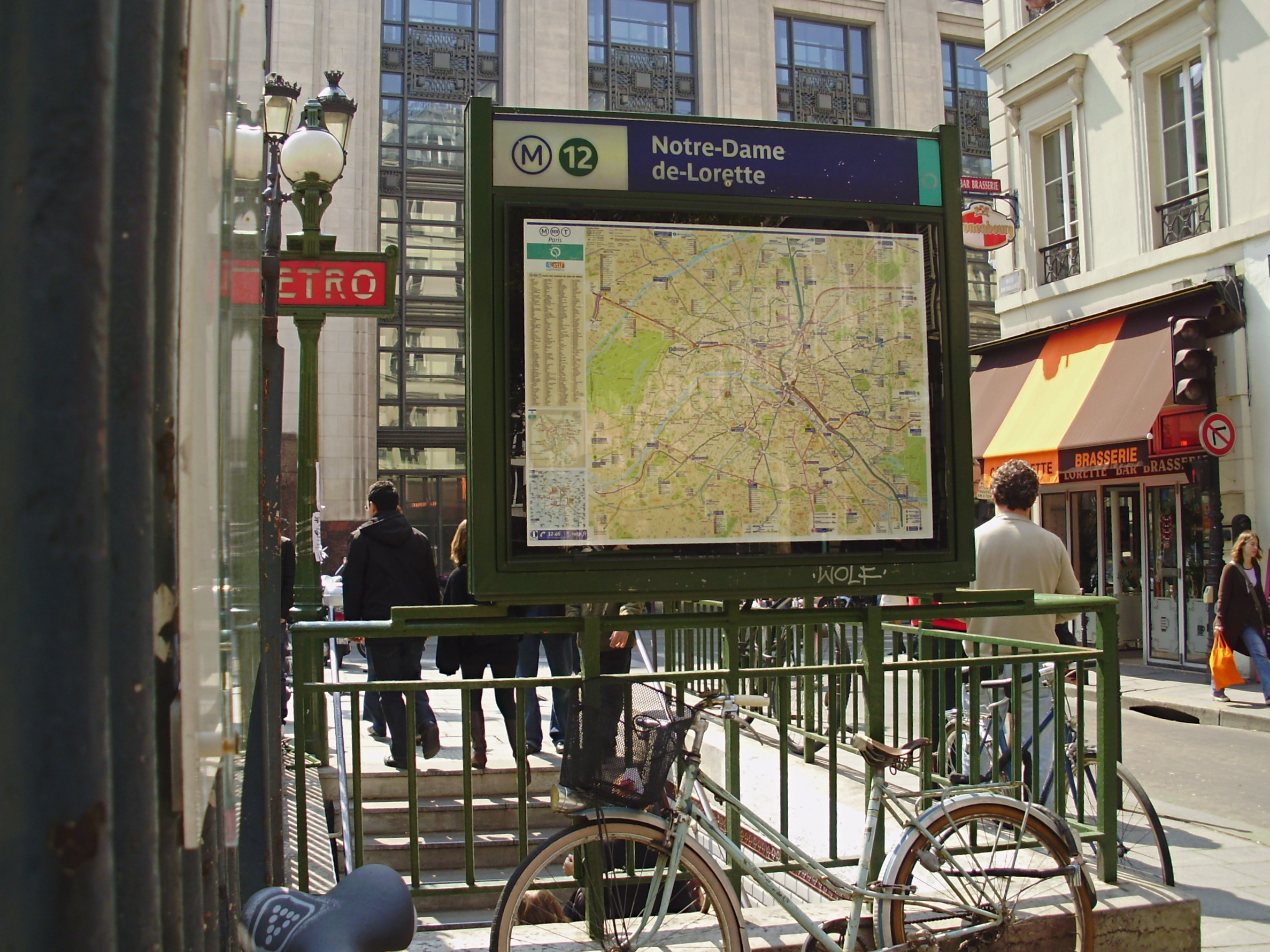 Entrée de la station Notre-Dame-de-Lorette du métro de Paris